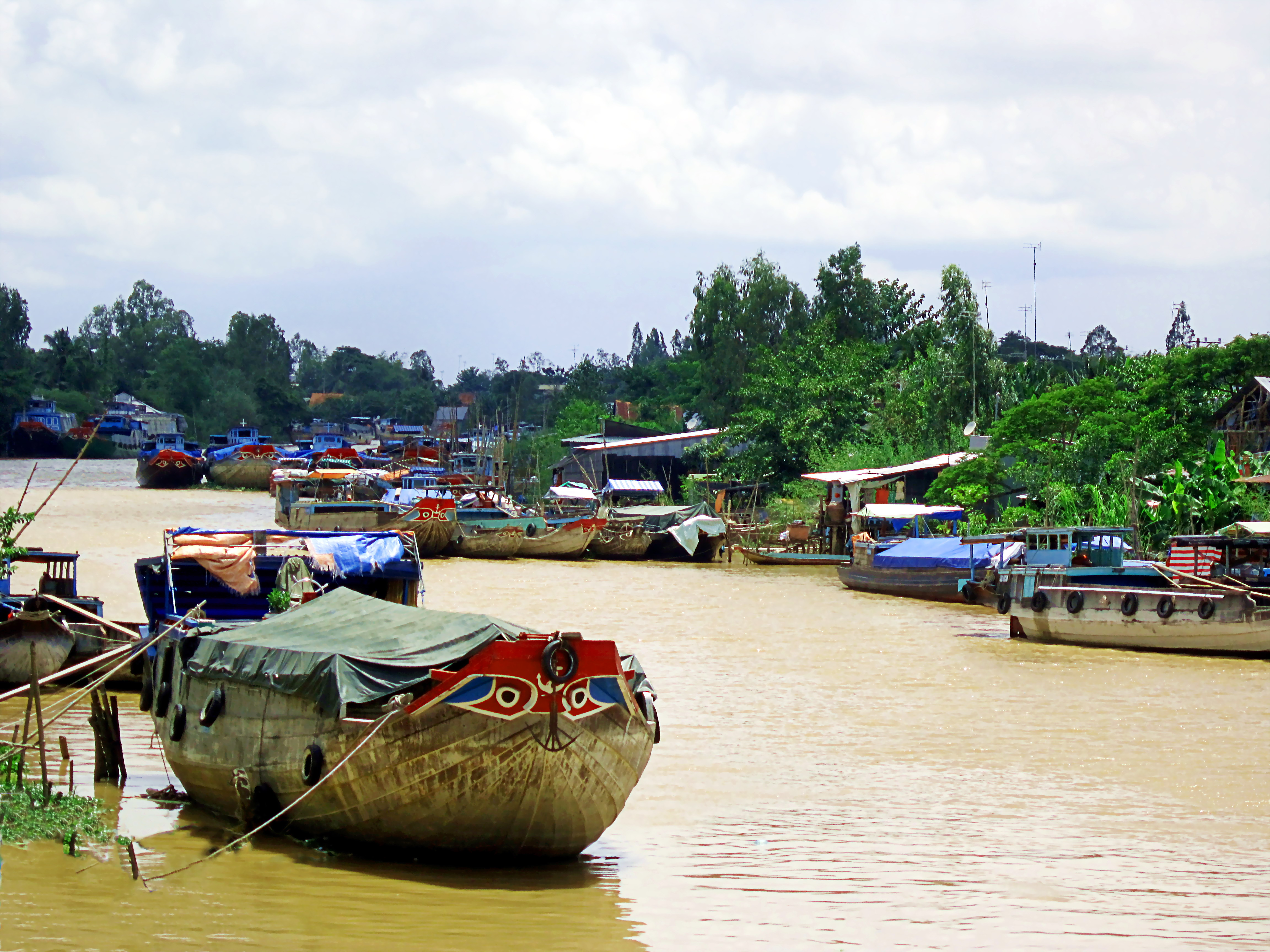 Rạch Ông Chưởng, đoạn gần dinh Long Kiến thờ danh tướng Nguyễn Hữu Cảnh; thuộc xã Long Kiến, huyện Chợ Mới, tỉnh An Giang, Việt Nam.